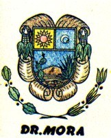 Las imagenes representan lo que somos en Dr mora